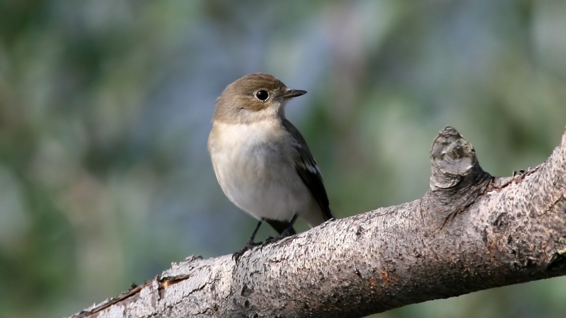 Pied Flycatcher Ficedula hypoleuca, Rheinspitz, Vorarlberg, Austria.